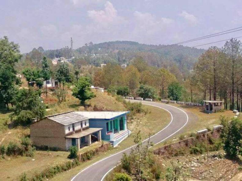 Jaurasi